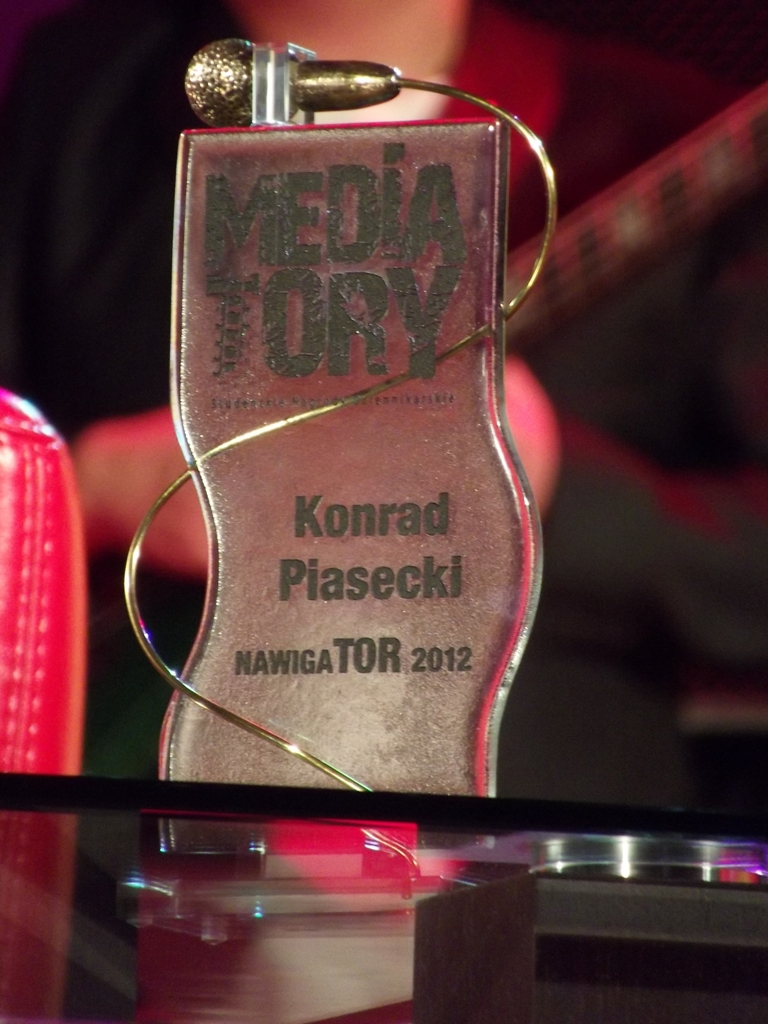 Zdjęcie zrobione podczas 6. gali rozdania studenckich nagród dziennikarskich MediaTory w Krakowie.